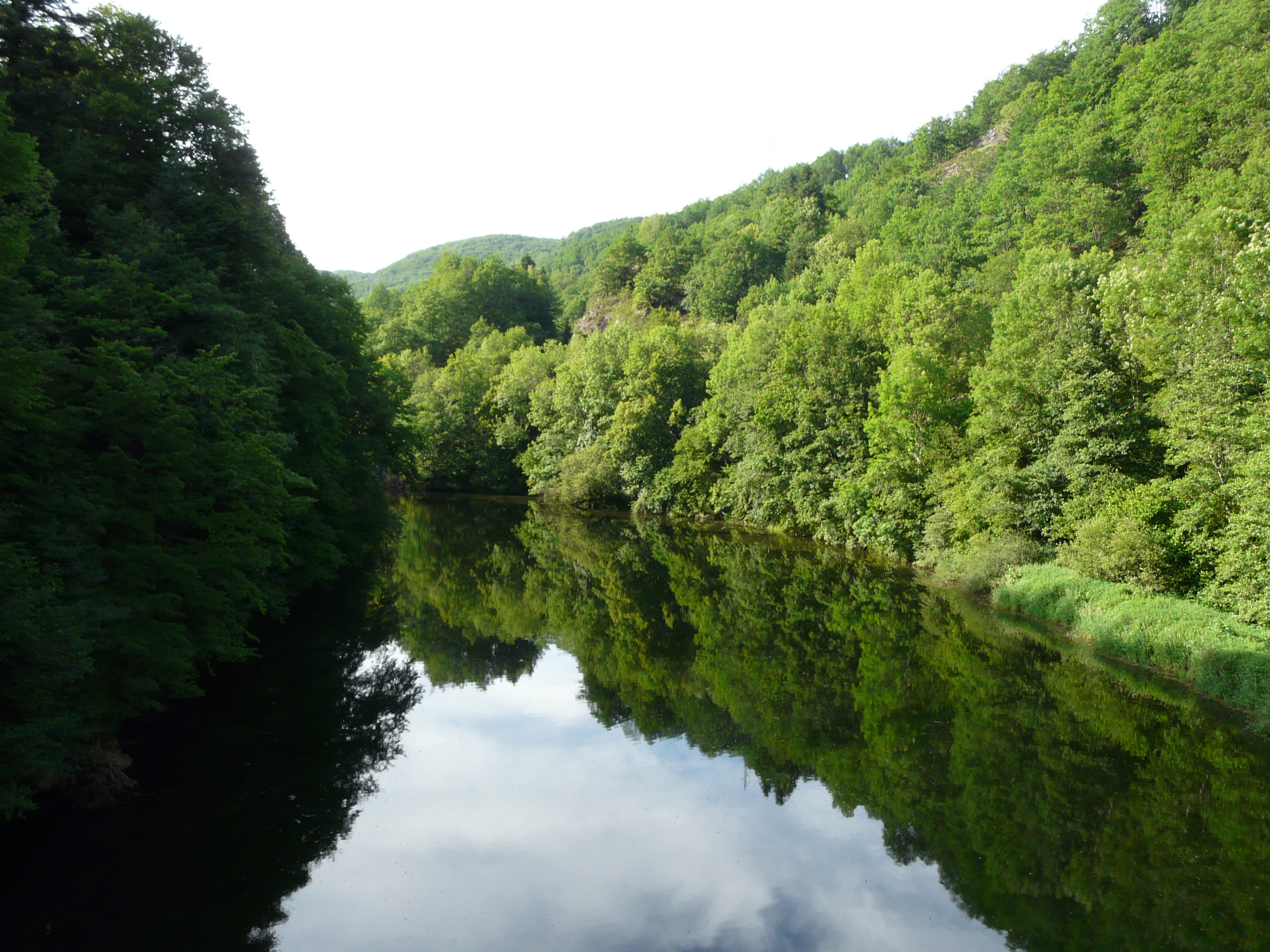 La Rhue (retenue du barrage de Vaussaire) au pont des Faux monnayeurs, en aval de le route départementale 679, entre les communes de Saint-Étienne-de-Chomeil à gauche et Trémouille à droite ; Cantal, France.